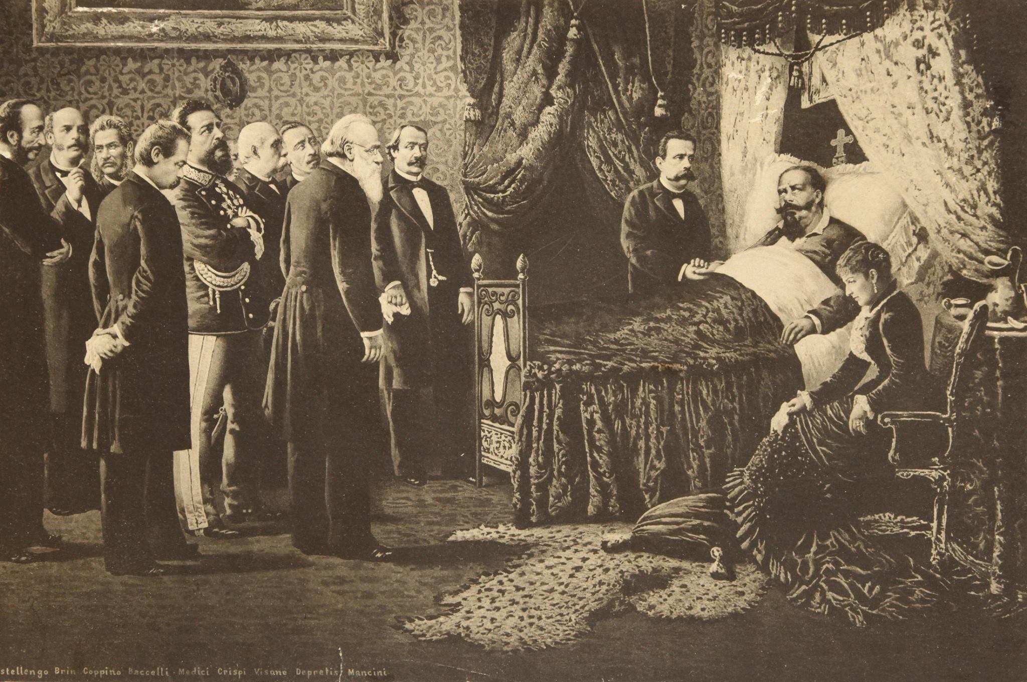 Ettore Ximenes, Gli ultimi momenti di Vittorio Emanuele II, ridotto, ritoccato, litografia